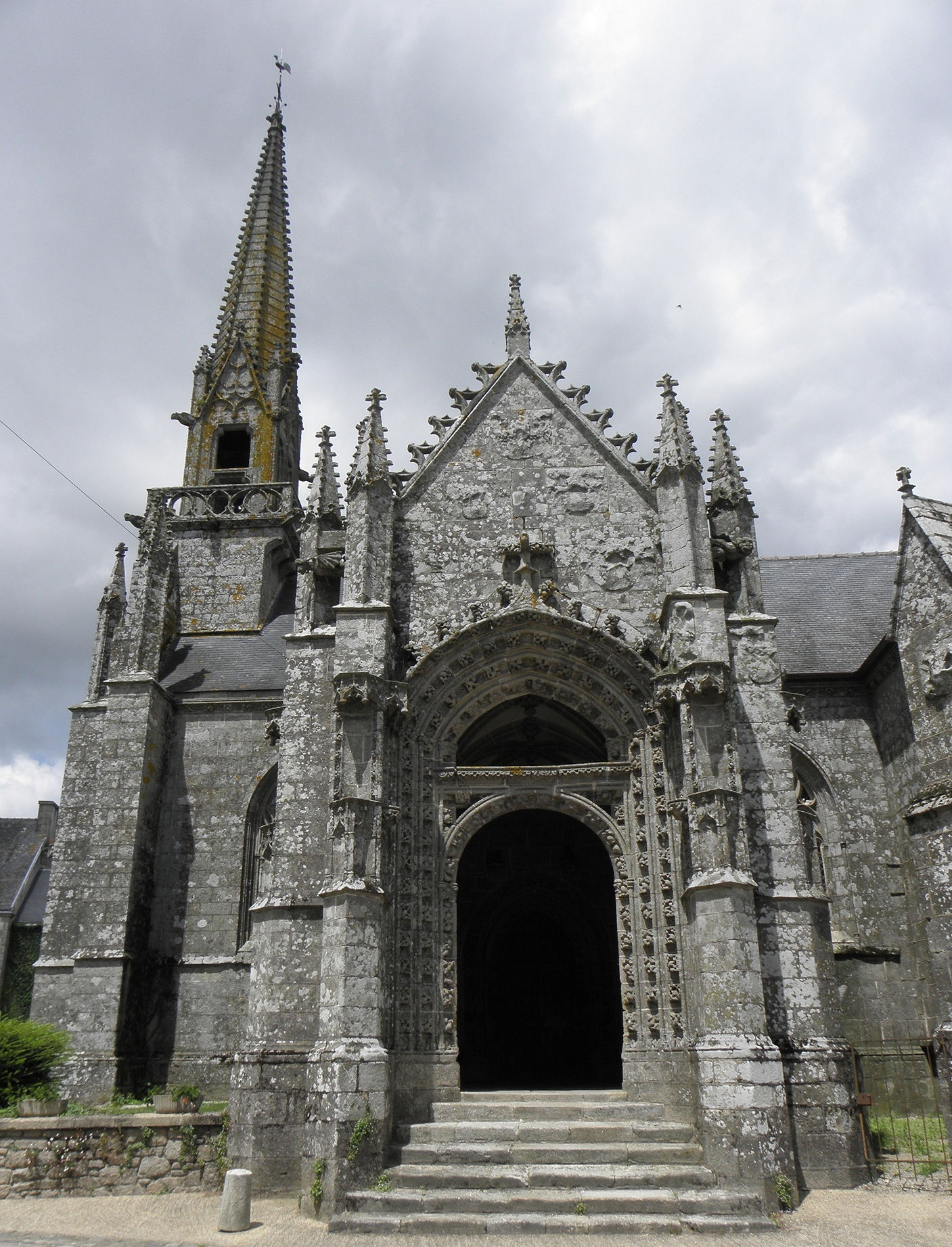 Vue méridionale du clocher et du porche des femmes de la chapelle Notre-Dame de Kernascléden (56). .